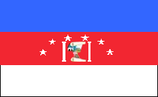 Bandera del municipio Paz Castillo, estado Miranda, Venezuela